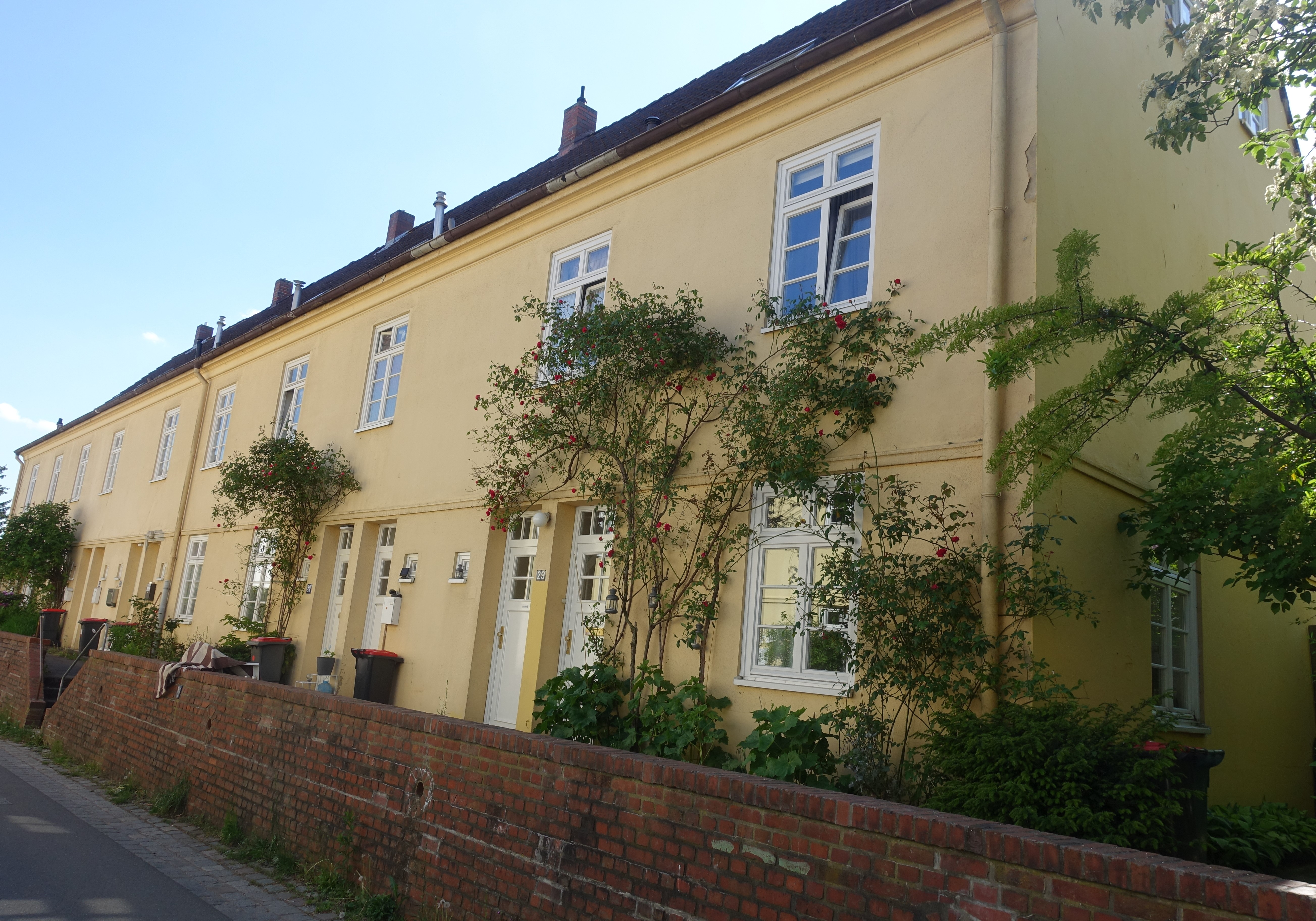 Wohnhaus von Georg Hempel im Steenkamp (2020).